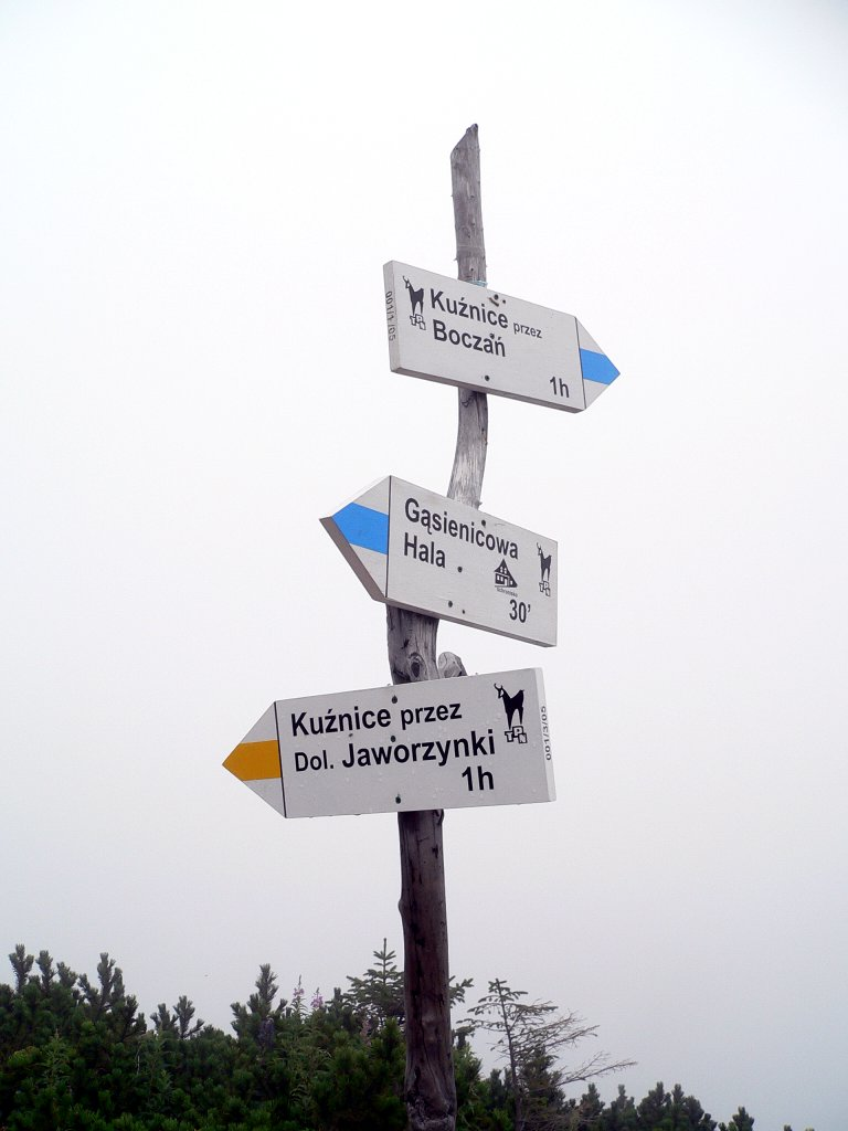 Rozgałęzienie szlaków - Przełęcz między Kopami